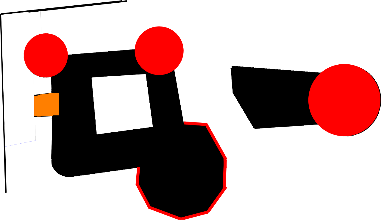 castello di gallipoli dall'alto